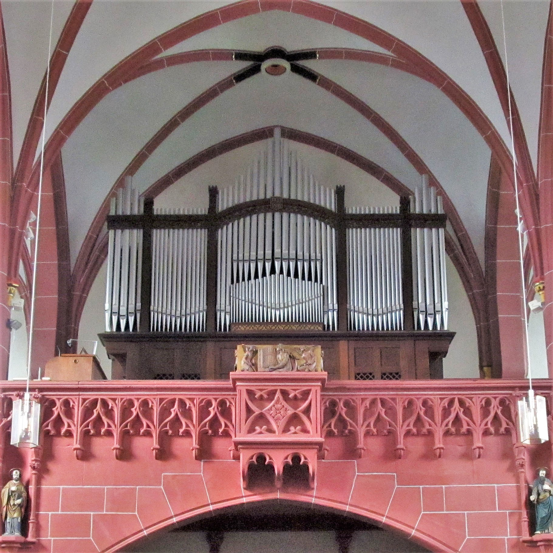 Orgelempore der katholischen Pfarrkirche St. Andreas in Homburg-Erbach, Saarland